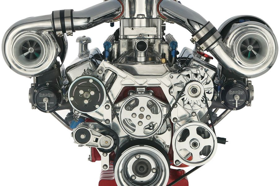 ਪੰਜਾਬੀ: ਟਰਬੋ ਇੰਜਣ